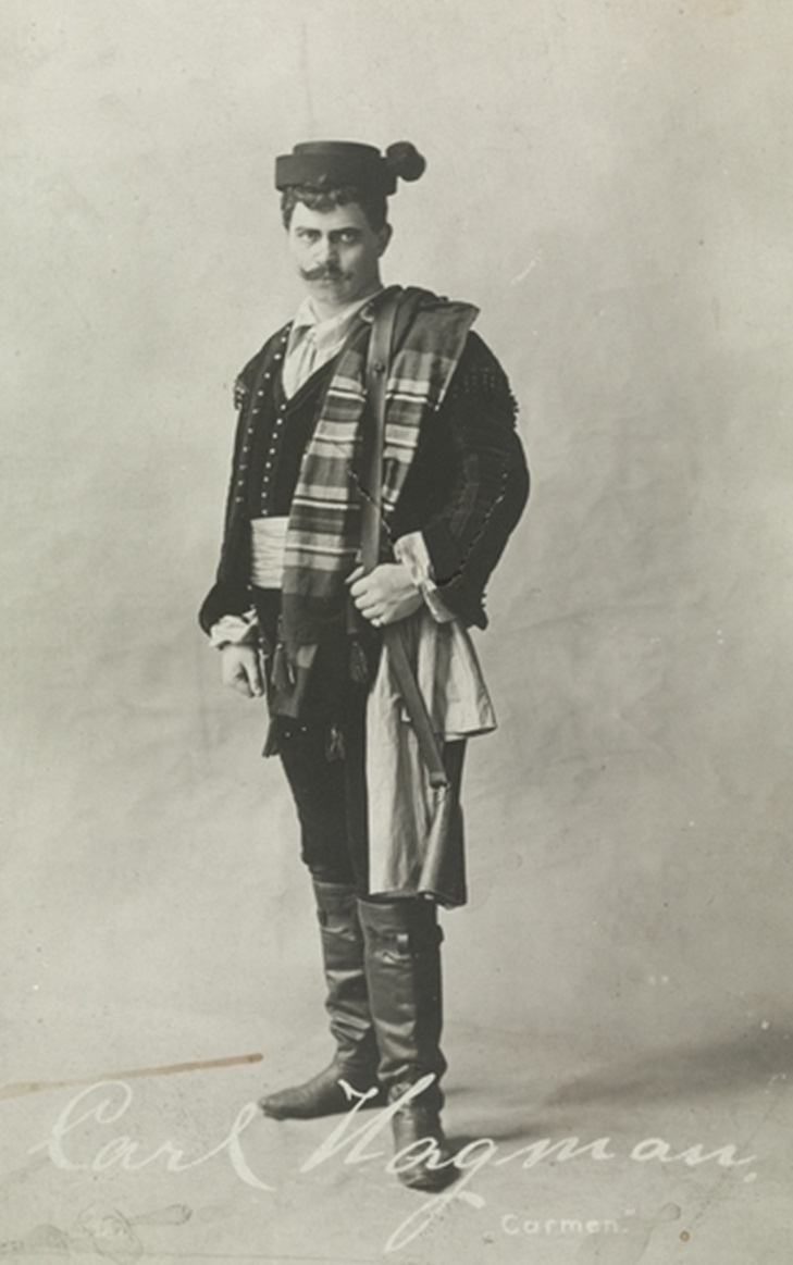 portrett, mann, operasanger, rollebilde, José i "Carmen" på Nationaltheatret, stående helfigur, kostyme.